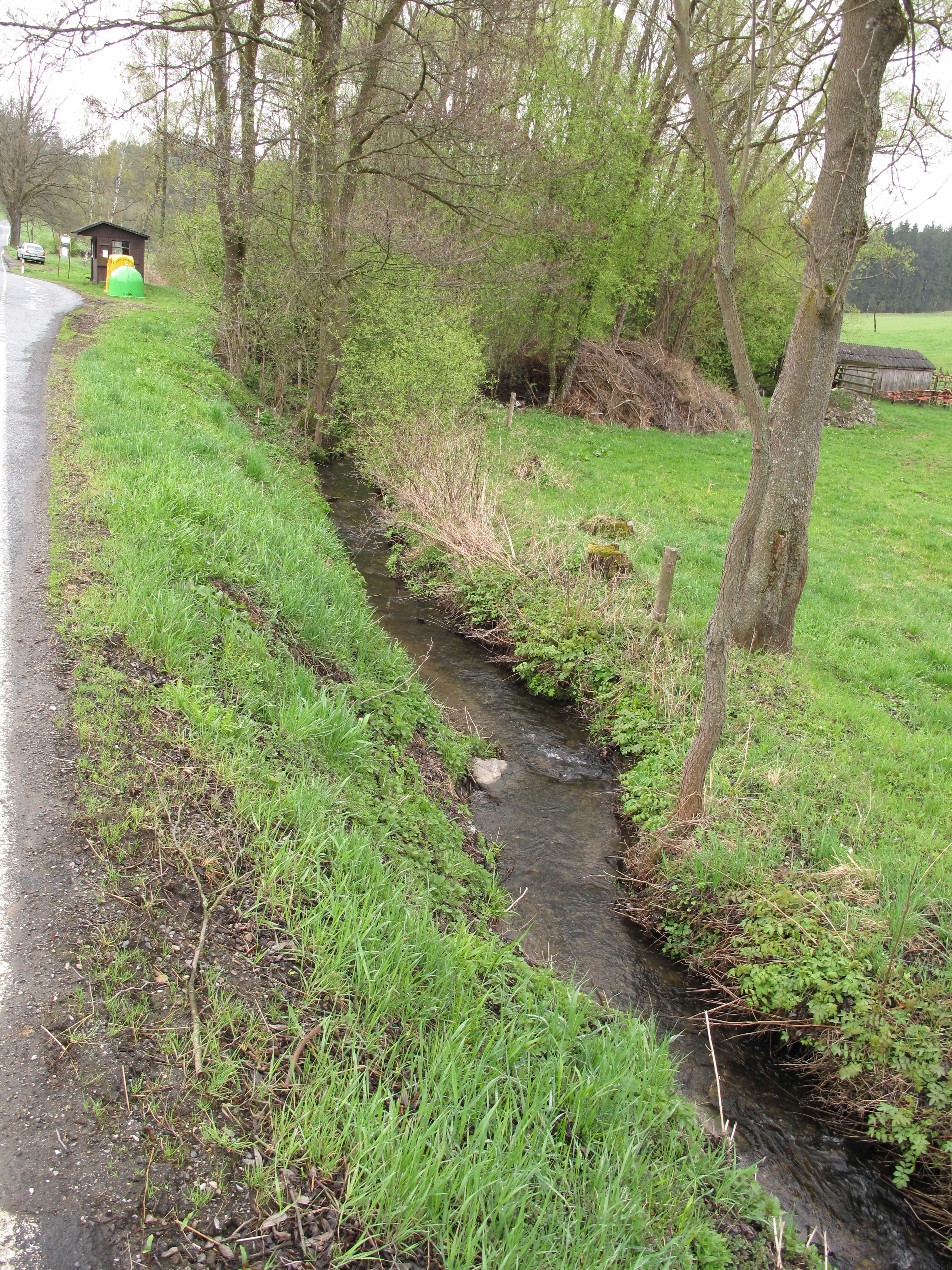 Pích. Okres Klatovy, Česká republika.